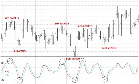 Courbe en chandeliers avec stochastiques associés